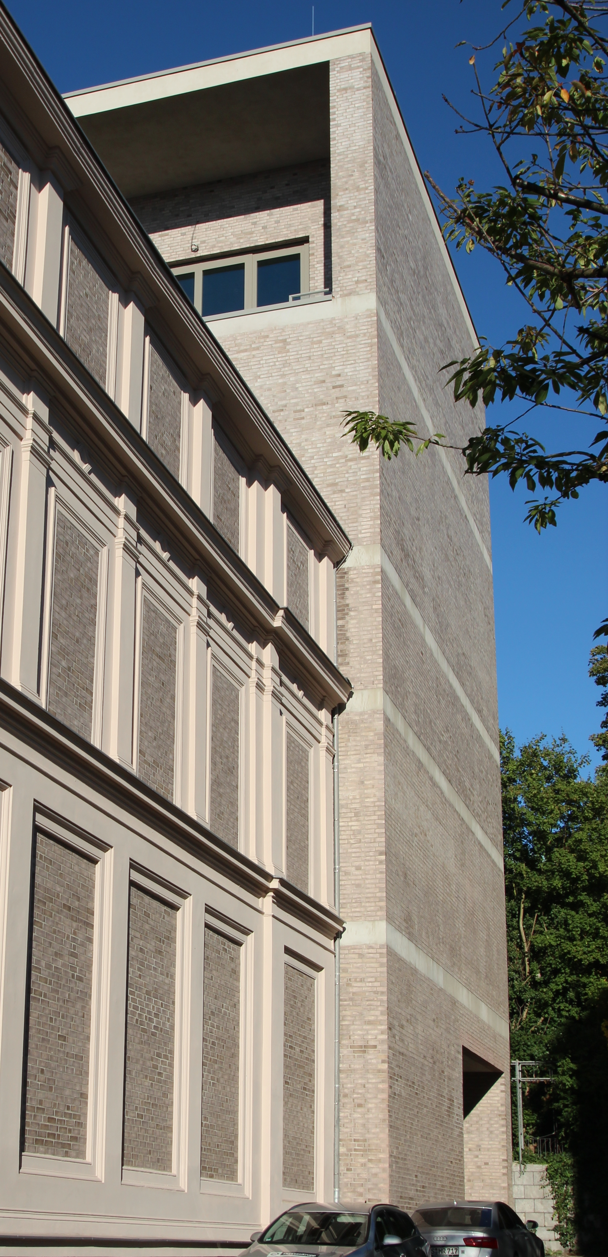 Turm des Stadtmuseums Kassel / Kulturhaus, Ständeplatz 16 in Kassel